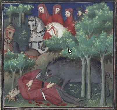 Smrt krále Filipa IV. při lovu